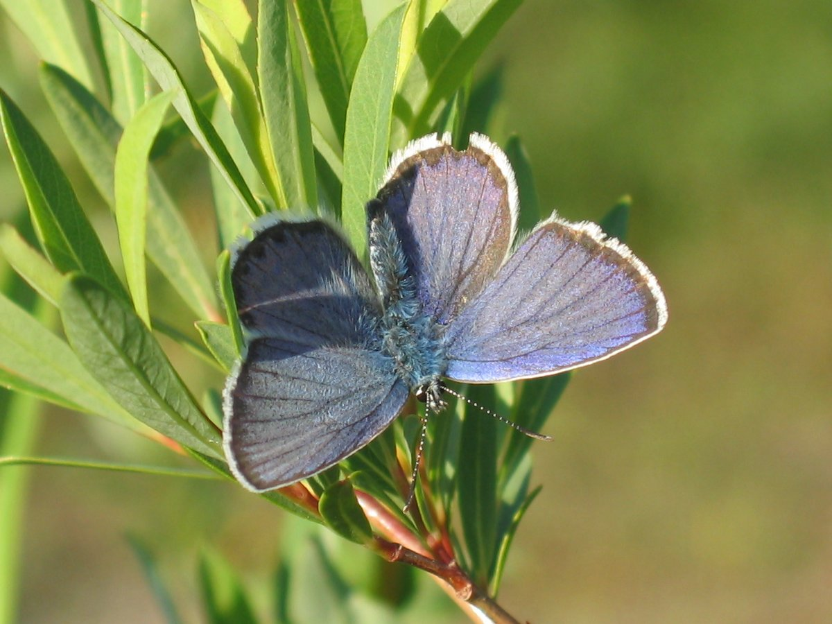 Lycaeidas idas